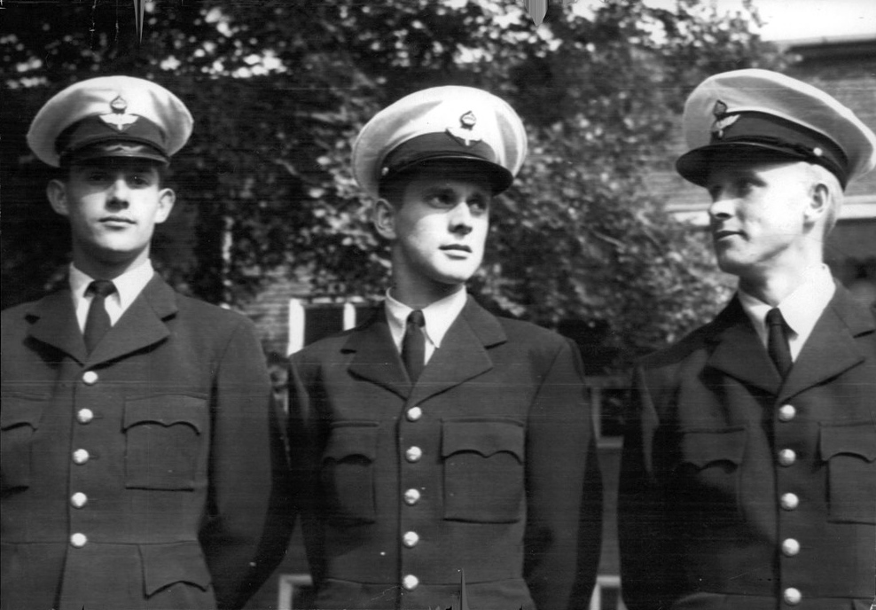 Kursens etta, Begt-Olof Forsberg (i mitten), och trea, Jan Tore Kågeman (till höger) kommer båda från Kristinehamn. Tvåan, Lars Erik Olsson (till vänster) kommer från Danderyd norr om Stockholm.25 nya fältflygare av tredje graden utexaminerades på fredagen från Krigsflygskolan på Ljungbyhed. De nya fältflygarna ryckte in den 15 augusti i fjol. Samtliga har avlagt realexamen. Som etta i kursen utgick Begt-Olof Forsberg, Kristinehamn. Tvåa blev Lars Erik Olsson, Danderyd, och trean Jan Tore Kågeman, Kristinehamn. Flygvapenchefen, generallöjtnant Axel Ljungdahl följde examensprovet i luften i ett reaskolplan av typen J 28 förd av flygeleven U. G. Rigby. Efter prov i luftnavigation, instruktionstjänst och flygning i samband med ubåtsövning fick de 25 fältflygarna sina gyllene vingar ur generalens hand.